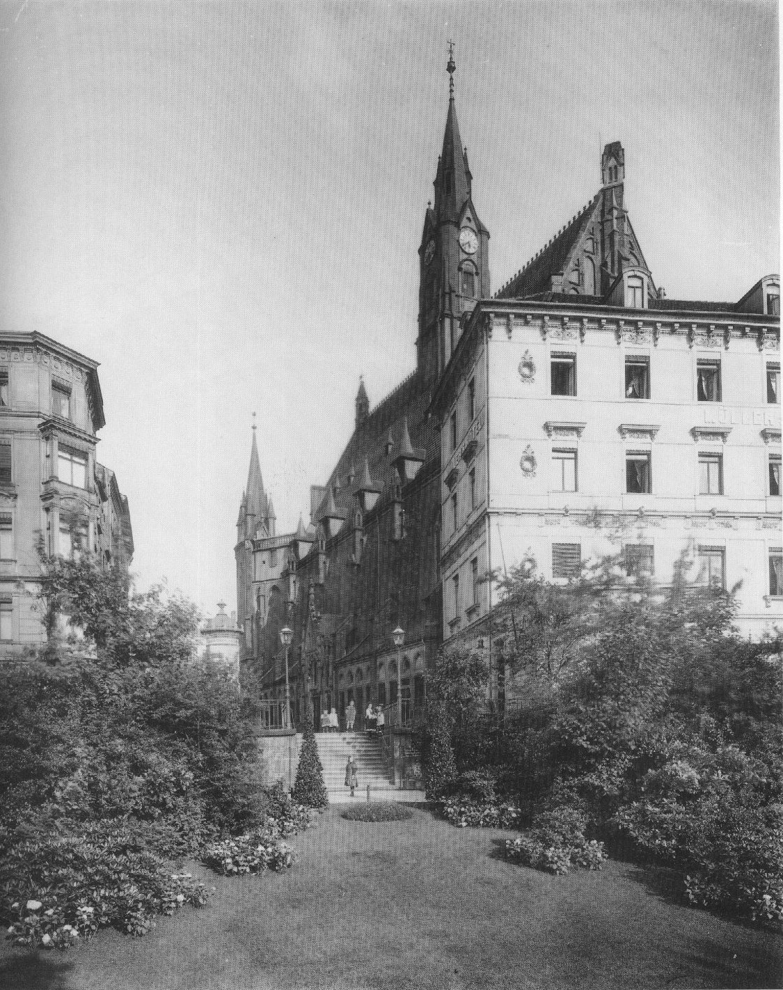 Matthäikirchhof Nr. 13, Matthäikirche, um 1900.